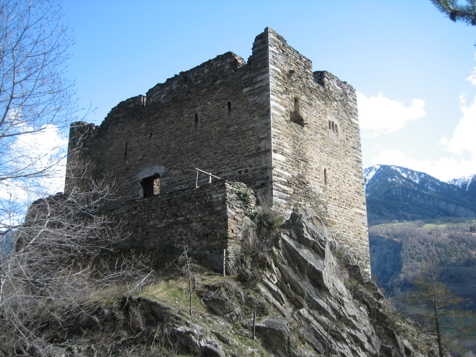 Neuburg